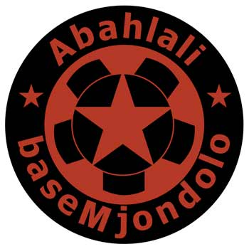 Logo of Abahlali baseMjondolo movement